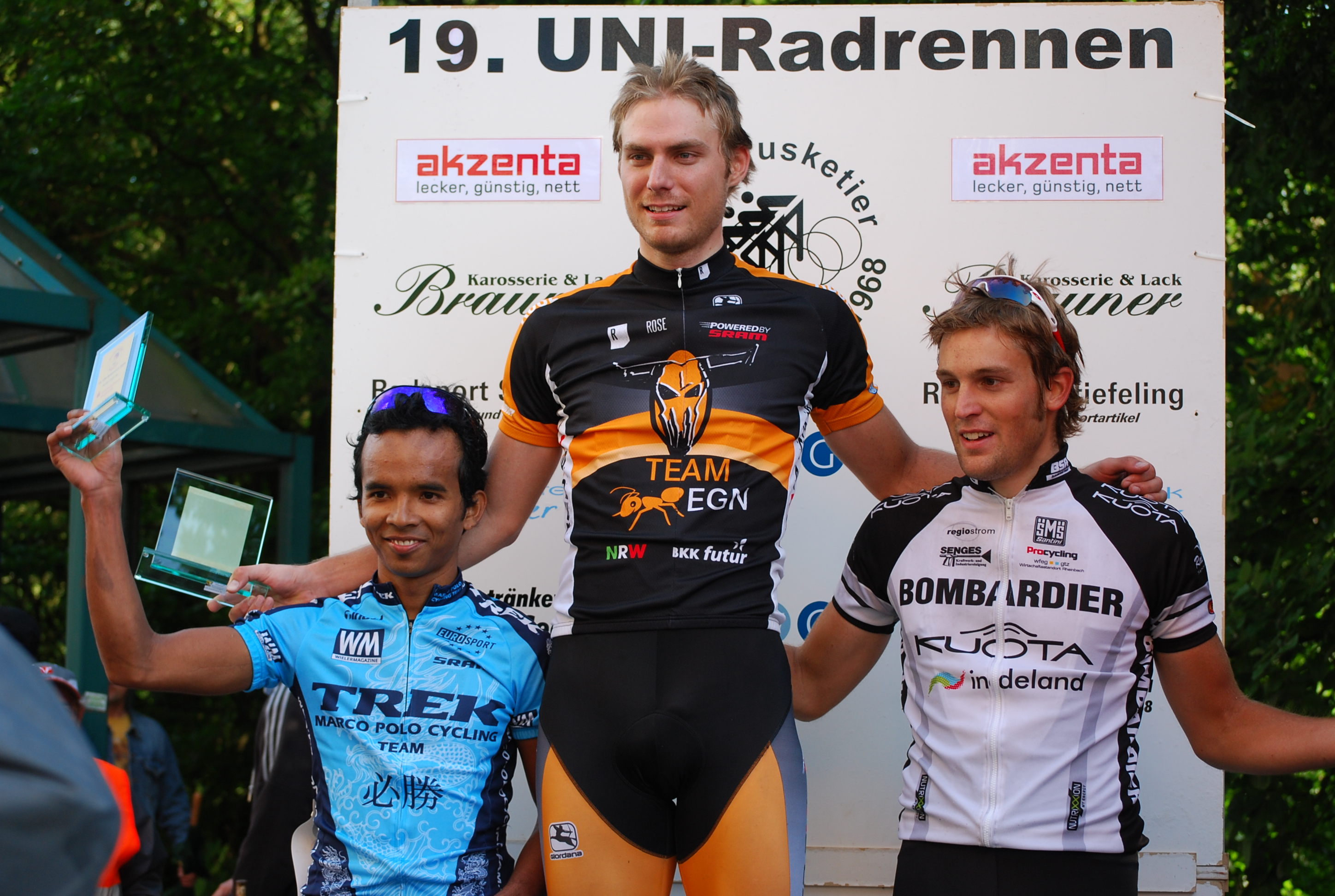 Siegerehrung des 19. Uni-Radrennen in Wuppertalvon links nach rechts: Ahmad Haidar Anuawar, Robert Sydlik, Joachim Tolles